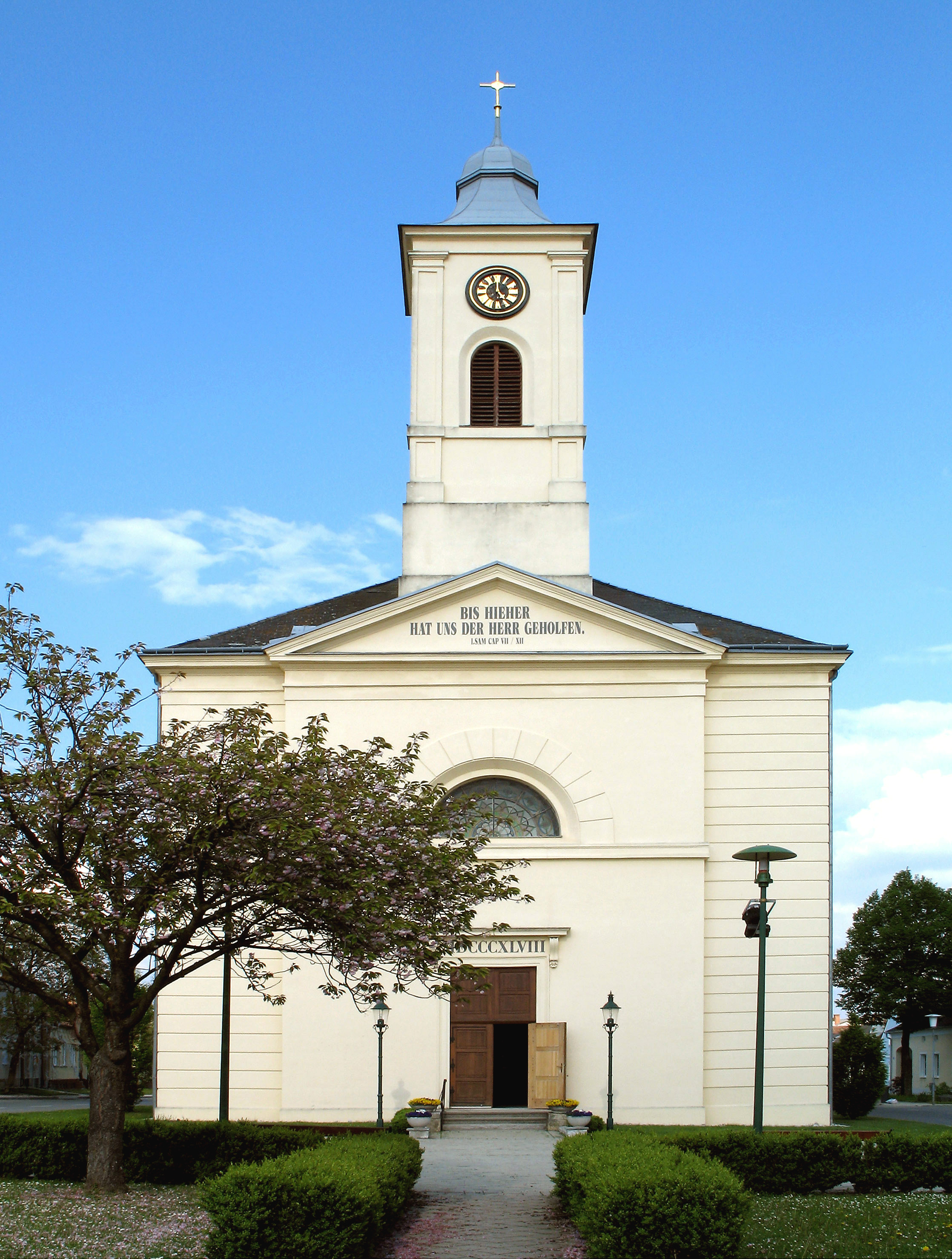 Evangelische Kirche in Lutzmannsburg (Austria)